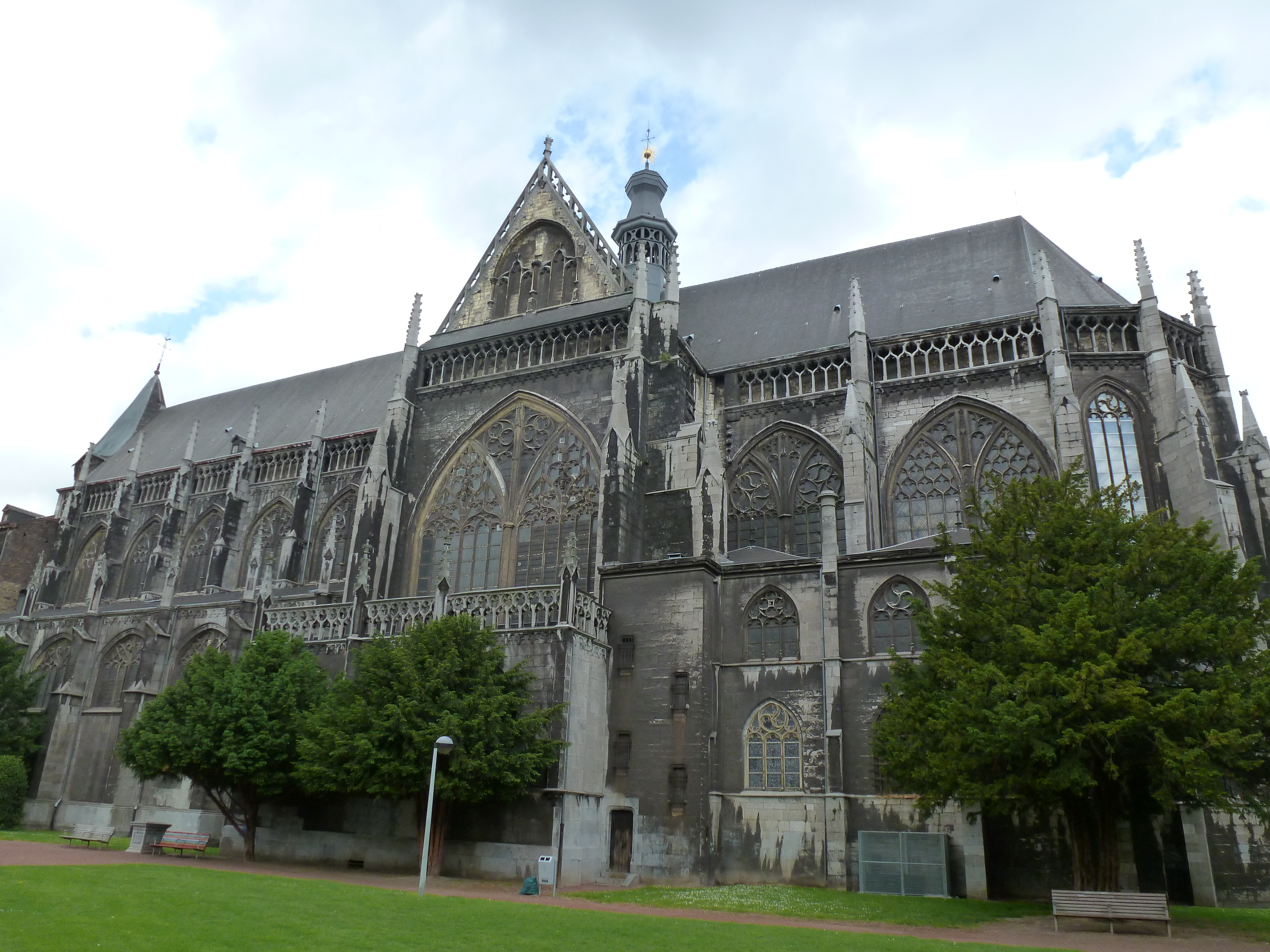 vue extérieure